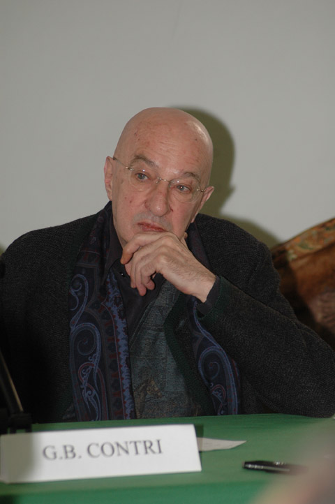 trattasi di riduzione di una foto da me scattata in occasione di una conferenza tenuta dal prof. G.B. Contri nell'ottobre 2009